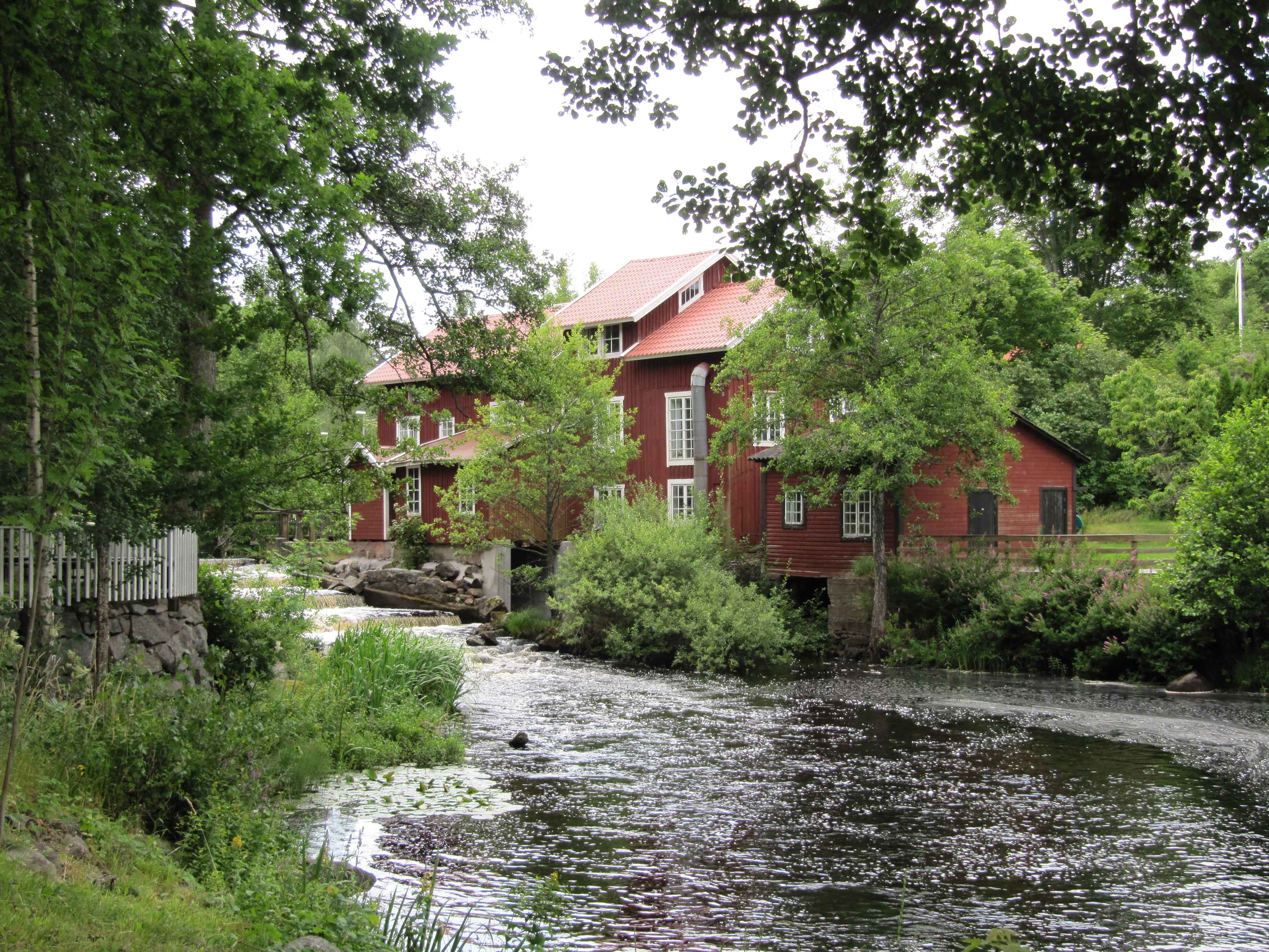 Vattenfall i Mörtfors, Oskarshamns kommun